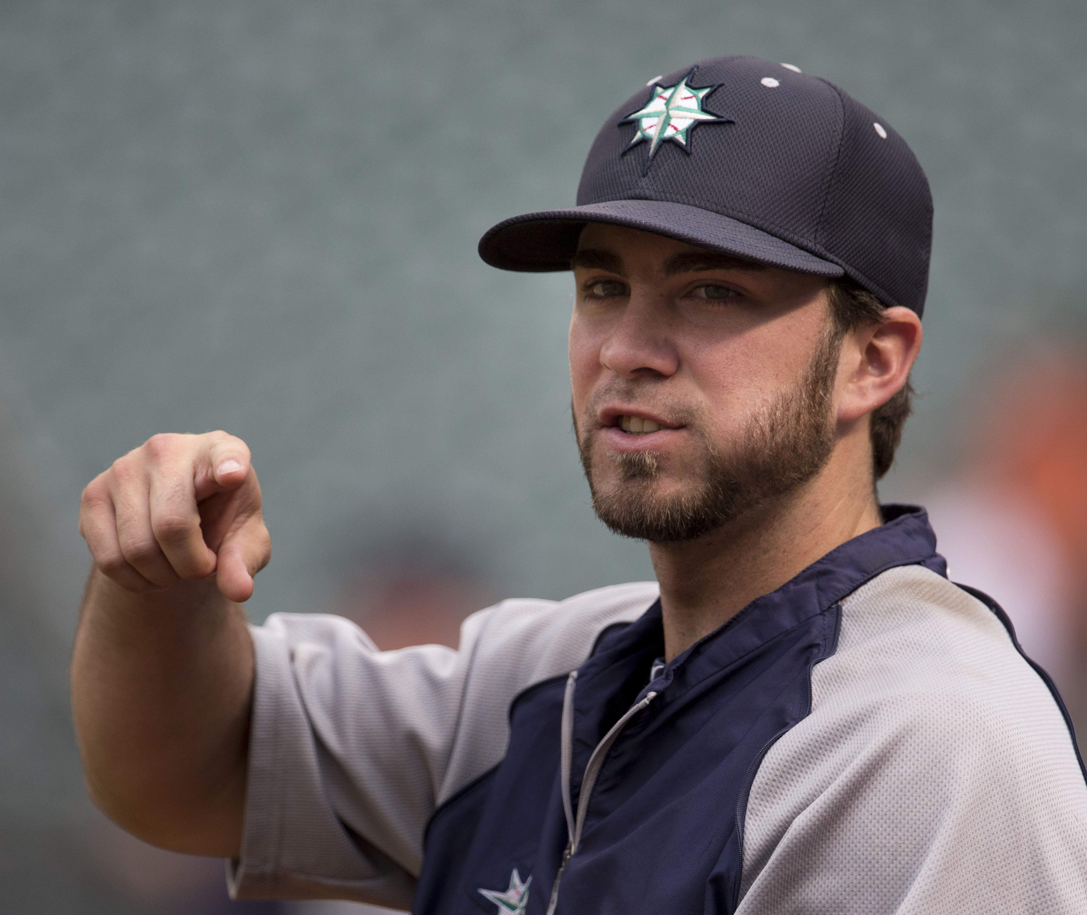 Nick Franklin